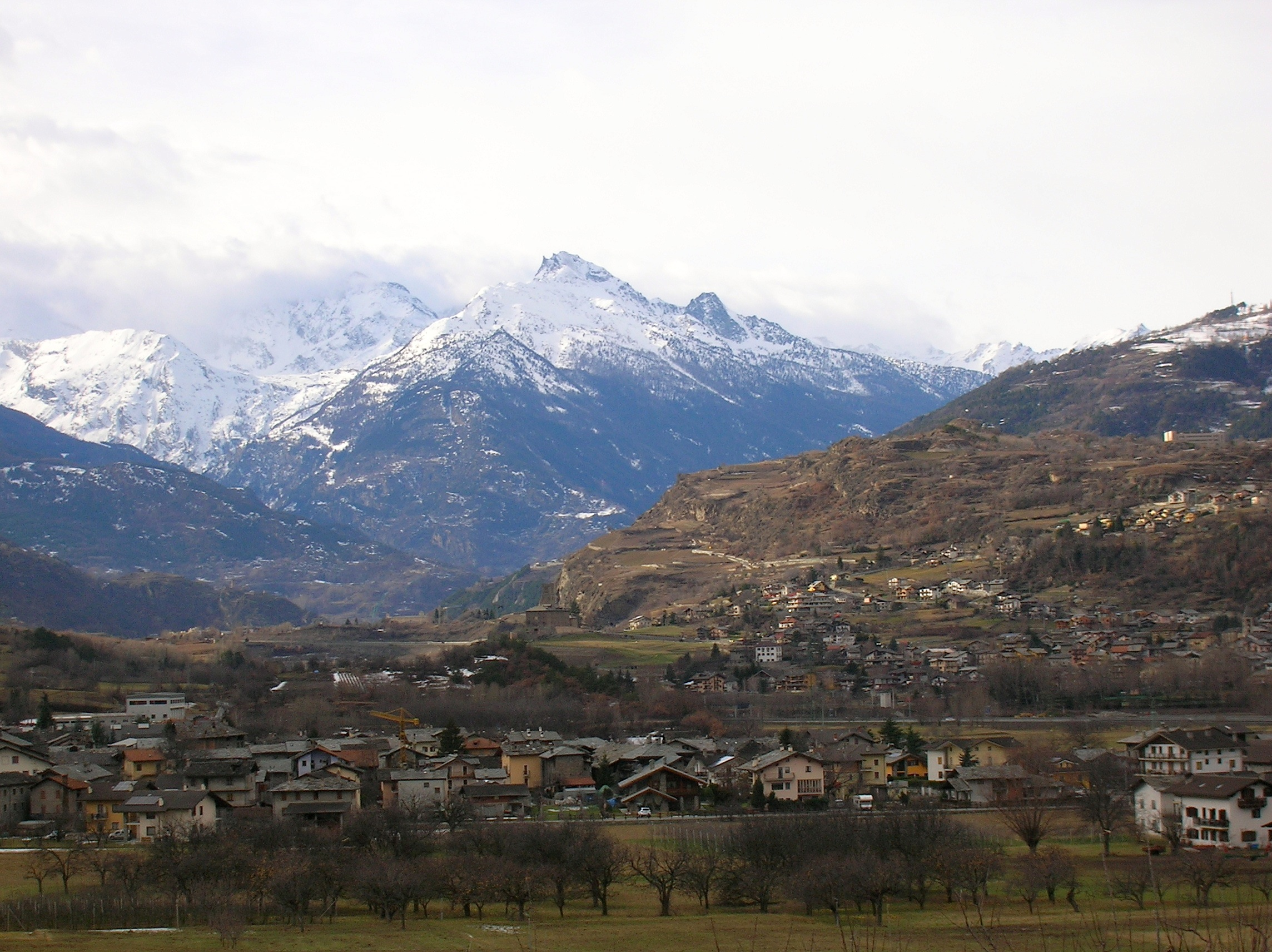 panorama di Jovencan e Sarre visti da Gressan, Valle d'Aosta, Italia.